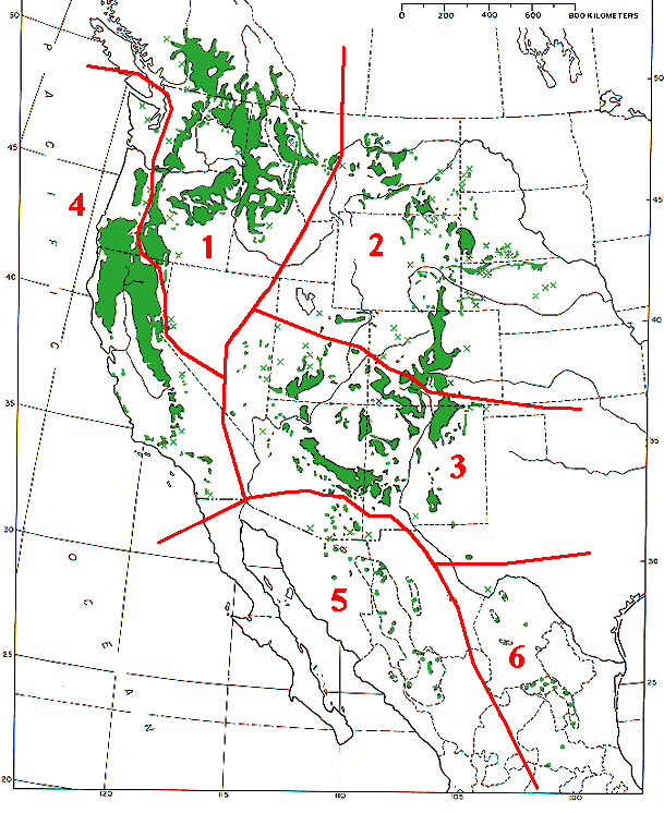 Range map of Pinus ponderosa and Pinus arizonica Pinus ponderosa subsp. ponderosa - North Plateau Ponderosa Pine Pinus ponderosa subsp. scopulorum - Rocky Mts Ponderosa Pine Pinus ponderosa subsp. brachyptera - Southwestern Ponderosa Pine Pinus ponderosa subsp. benthamiana - Pacific Ponderosa Pine Pinus arizonica var. arizonica - Arizona Pine Pinus arizonica var. stormiae - Storm's Pine